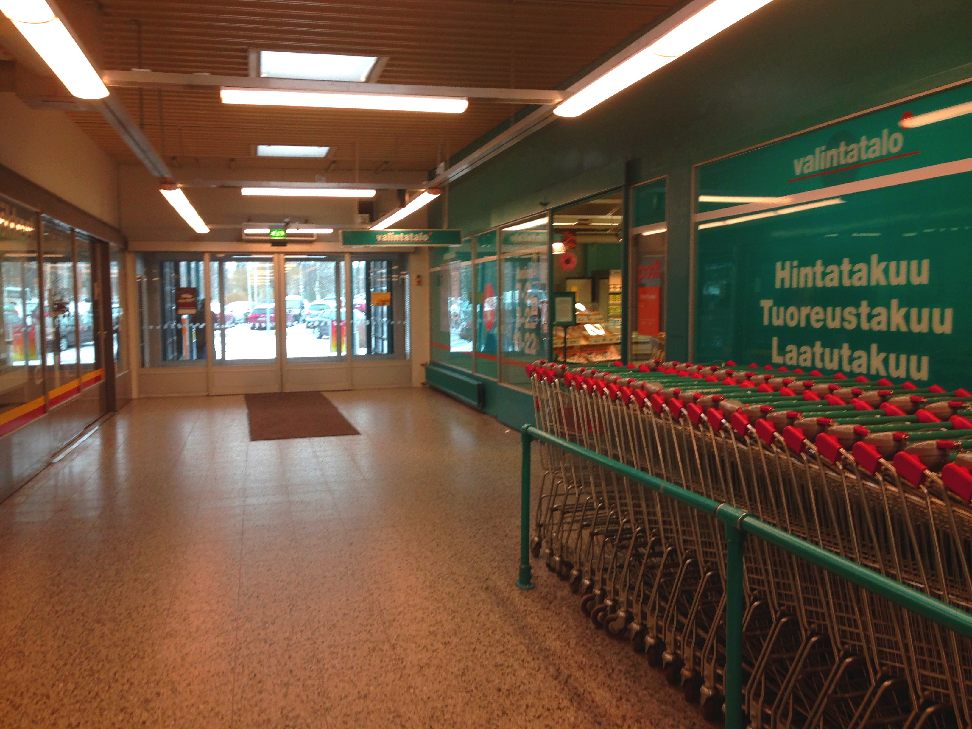 Gammelbackan Valintatalo sisältäpäin kuvattuna maaliskuussa 2017.